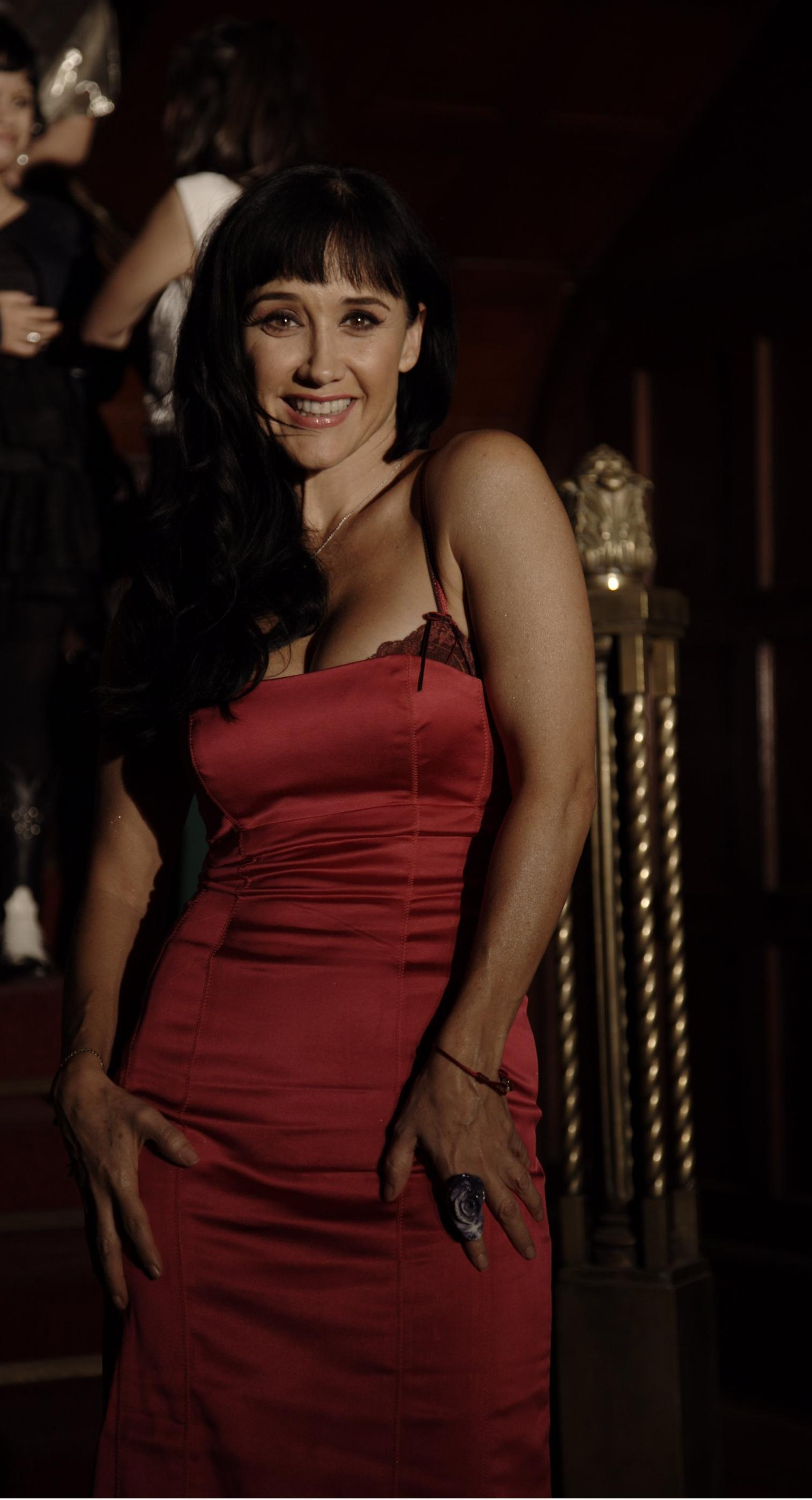 En mi libro, "cachondez" y "sensualidad" llevan su foto. Una de las Corregidoras que tomaron la Ciudad...